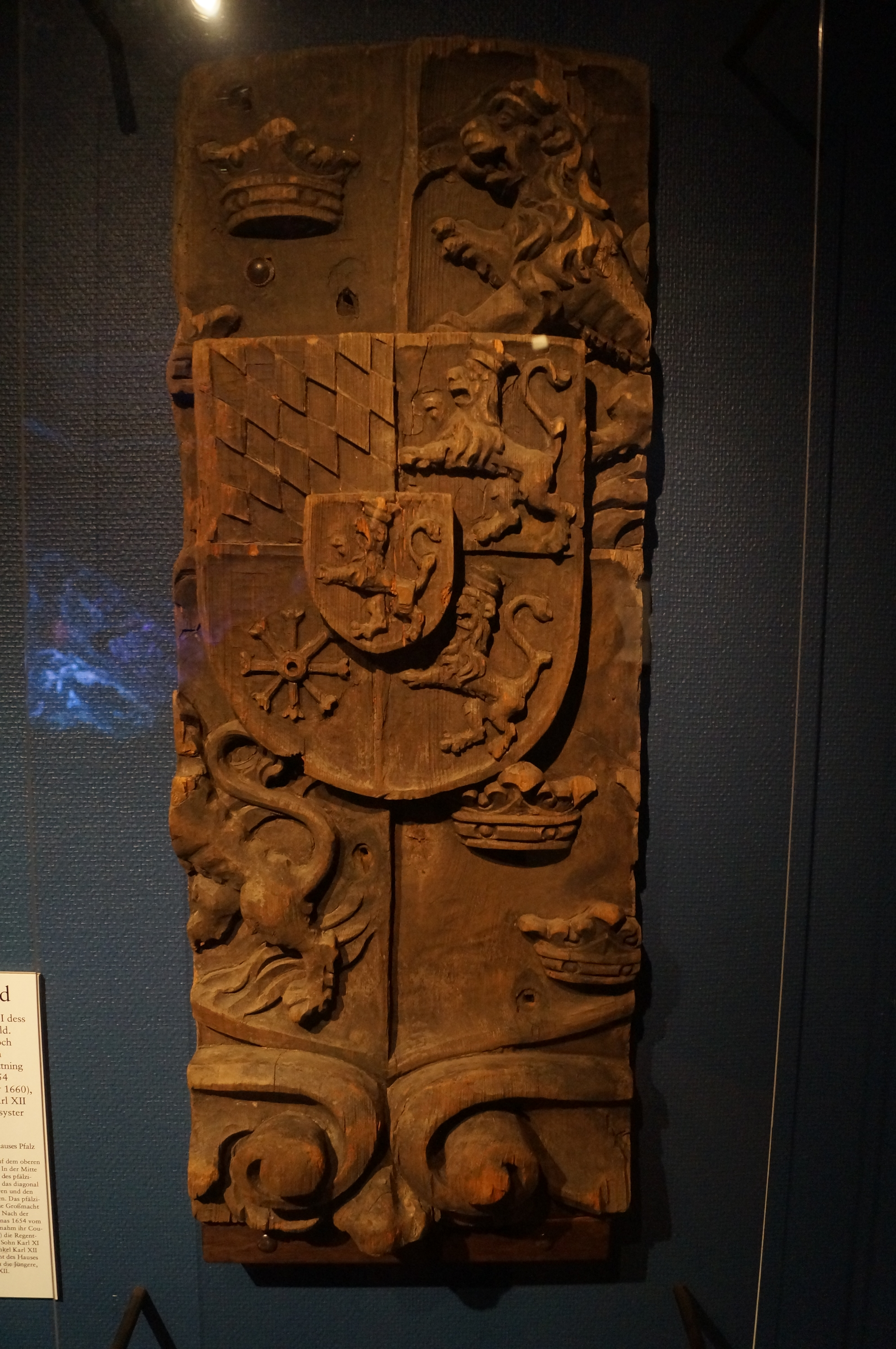 Ätten Pfalz vappensköld, bärgat från skeppet Kronan.